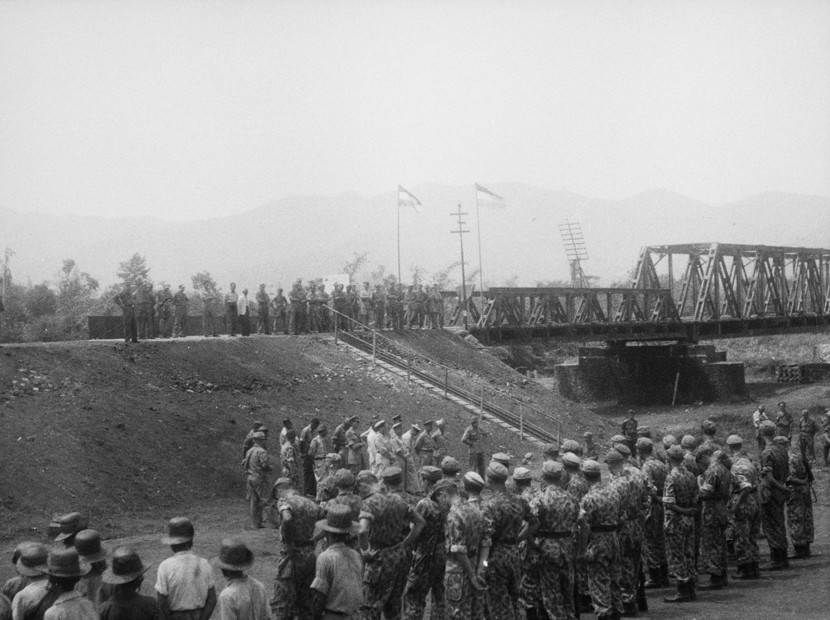 Collectie / Archief : Fotocollectie Dienst voor Legercontacten Indonesië Reportage / Serie : [DLC] Bandoeng doop Irenebrug door CO Amacab Beschrijving : Doop van de herstelde spoorbrug over de Tjitaroem bij Dajeuhkolot (Irenebrug) door Co Amacab [Commanding Officer — Allied Military Authority, Civil Affairs Branch]. Datum : 3 oktober 1946 Locatie : Bandung, Indonesië, Nederlands-Indië Fotograaf : Fotograaf Onbekend / DLC Auteursrechthebbende : Nationaal Archief Materiaalsoort : Negatief (zwart/wit) Nummer archiefinventaris : bekijk toegang 2.24.04.03 Bestanddeelnummer : 10215